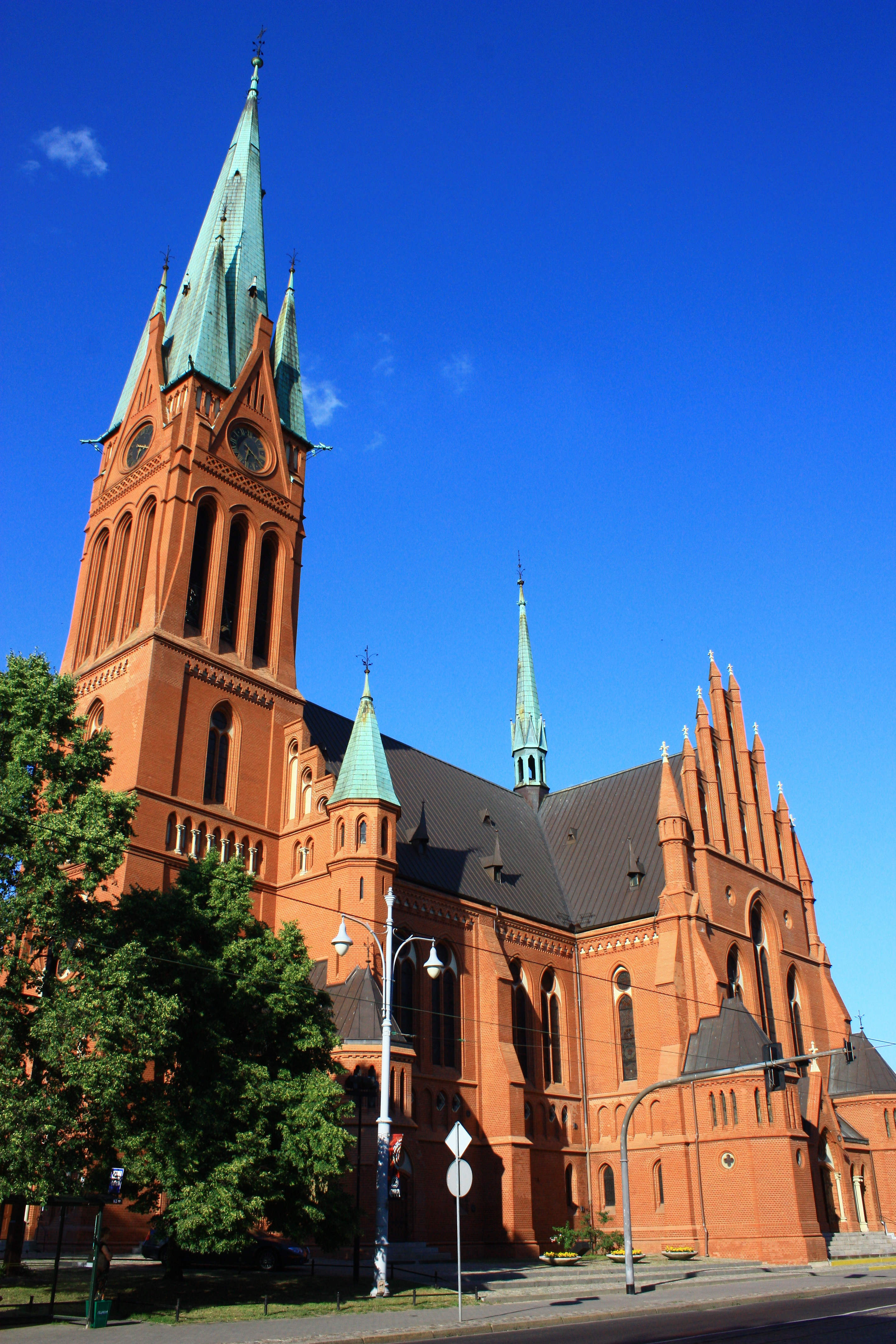 Toruń, d. kościół ewangelicki, ob. rzym.-kat. par. pw. św. Katarzyny (garnizonowy), 1894-1897